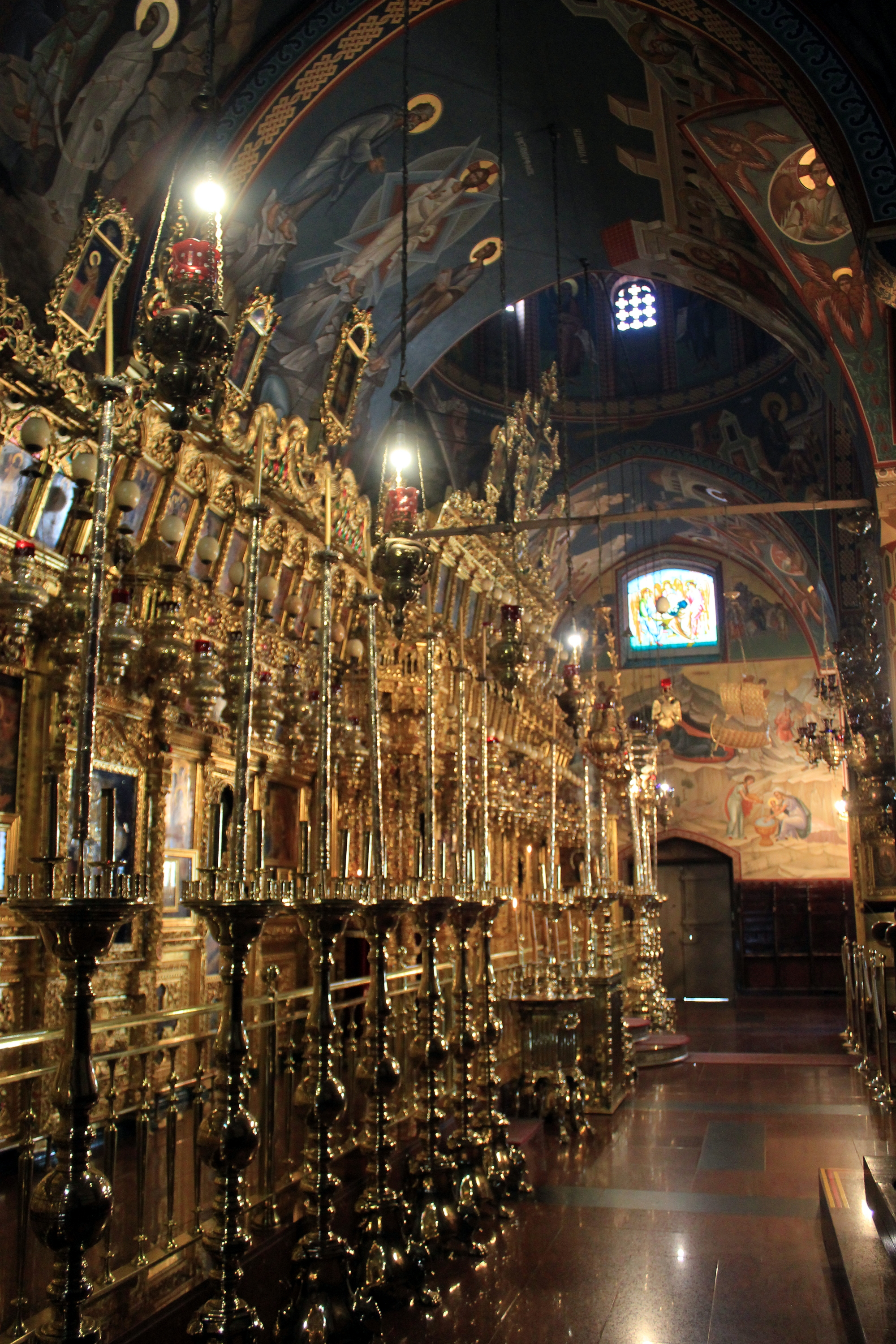 Die Ikonenwand der Klosterkirche von Kykkos, Zypern.